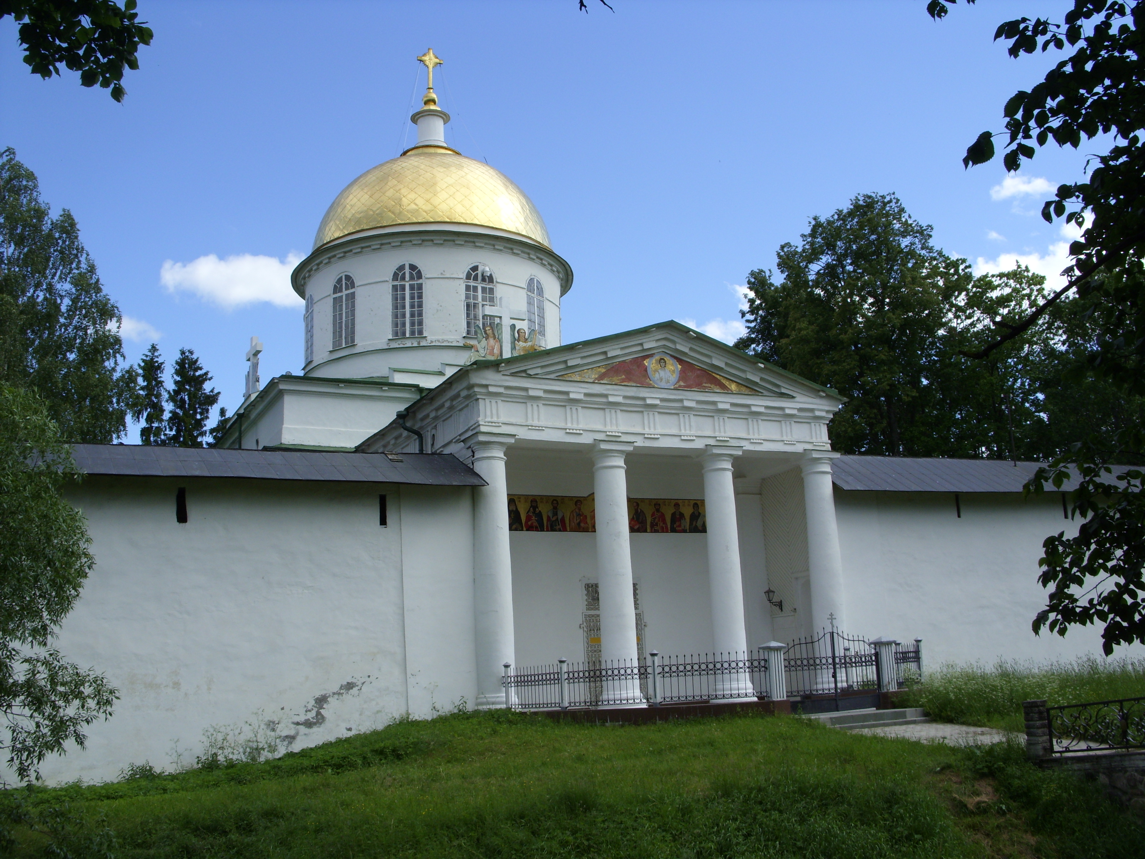 Pskovo-Pechersky Monastery. Mikhaila Arkhangela